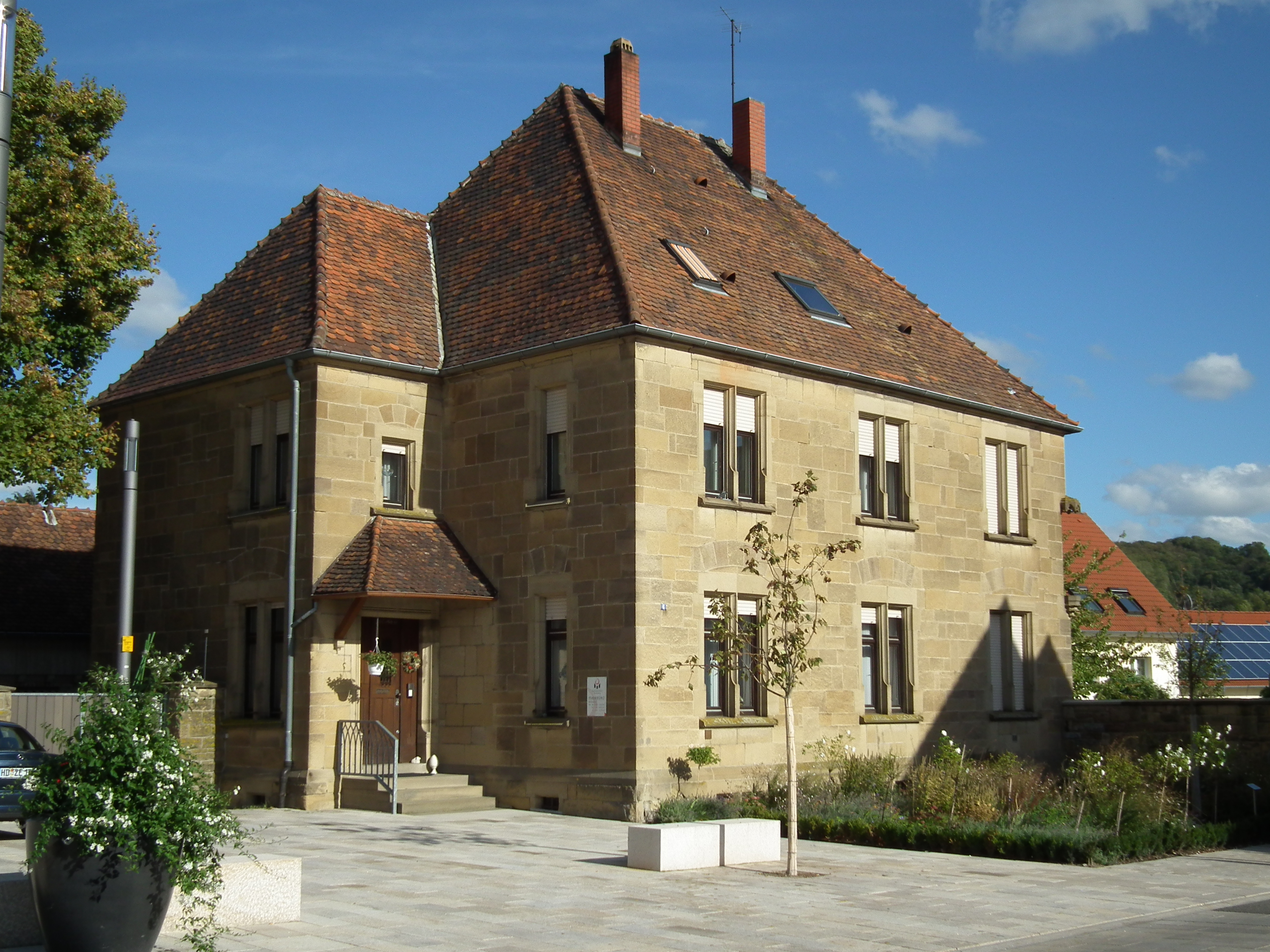 Katholisches Pfarrhaus in Rauenberg (Baden-Württemberg, Deutschland)